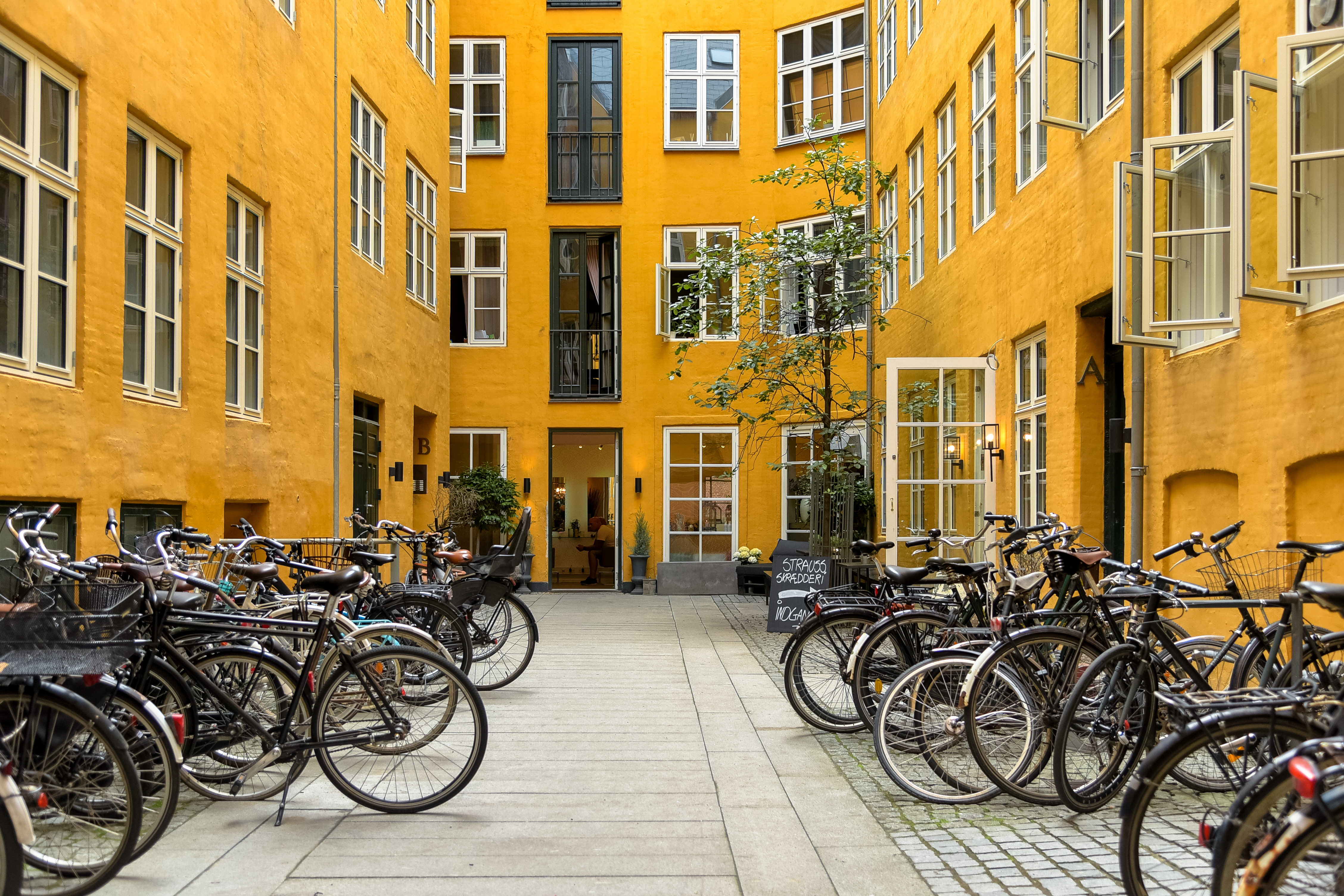 The courtyard of Løvstræde 8 in Copenhagen, Denmark